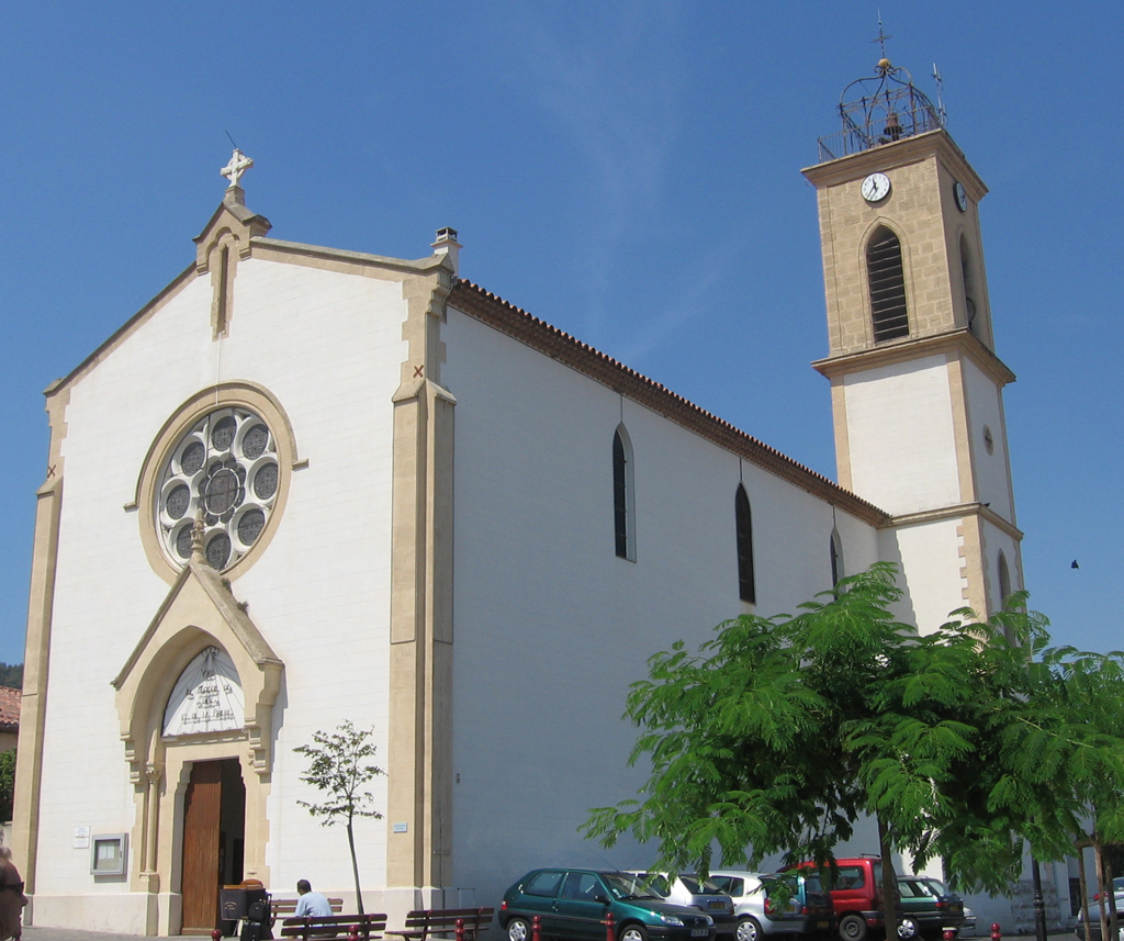 Église paroissiale Sainte-Cécile de Châteauneuf-les-Martigues